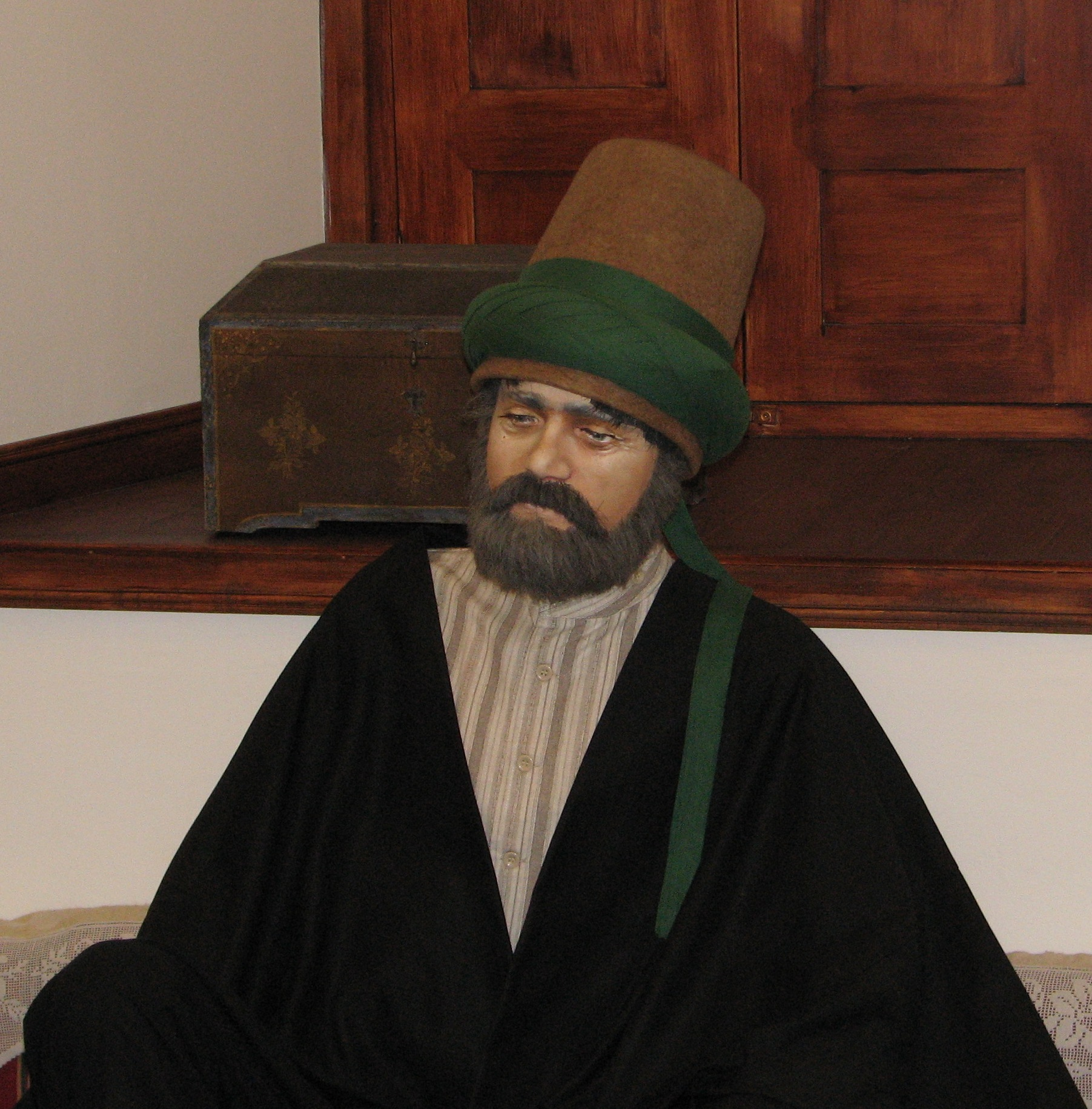 Derviš med meditacijo; Mevlanov mavzolej, Konya, Turčija.